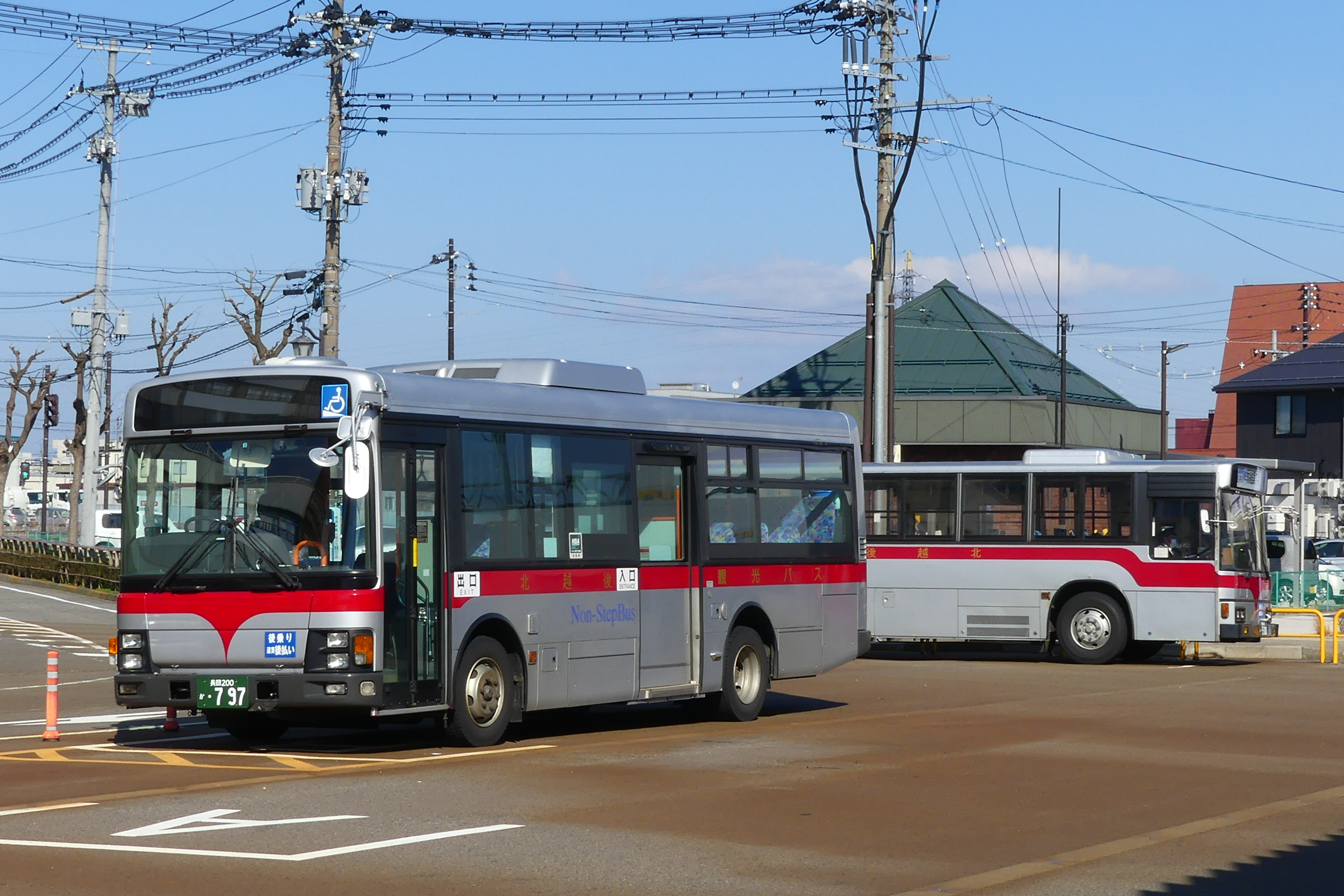 北越後観光バス(柏崎駅前にて撮影)